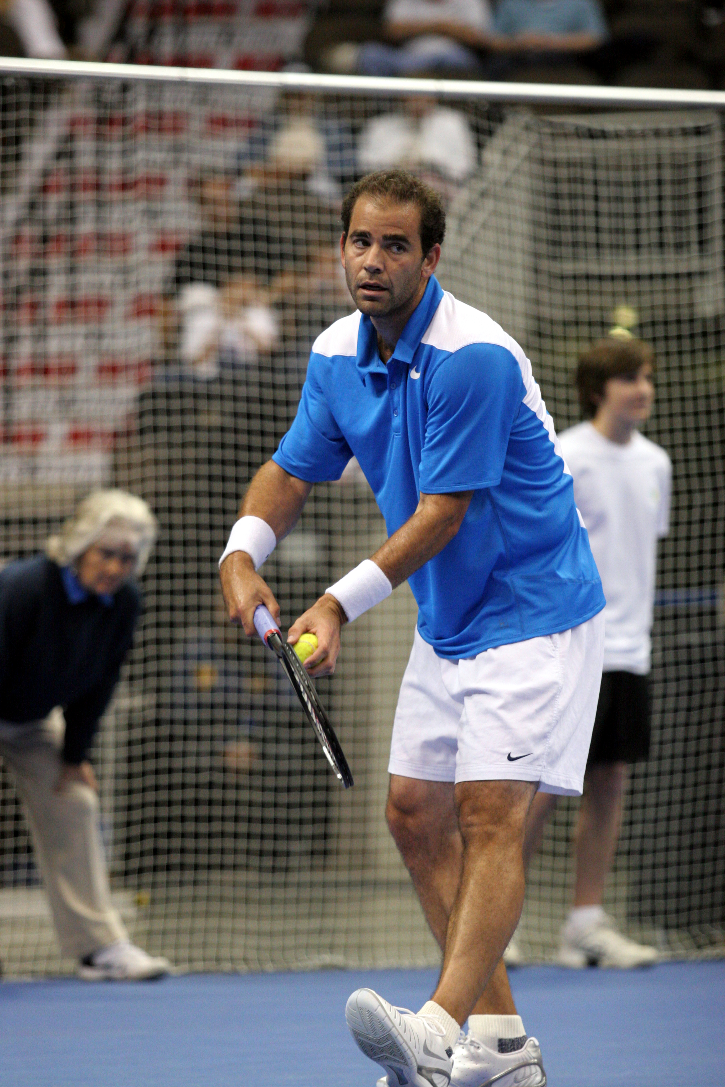 Pete Sampras serving